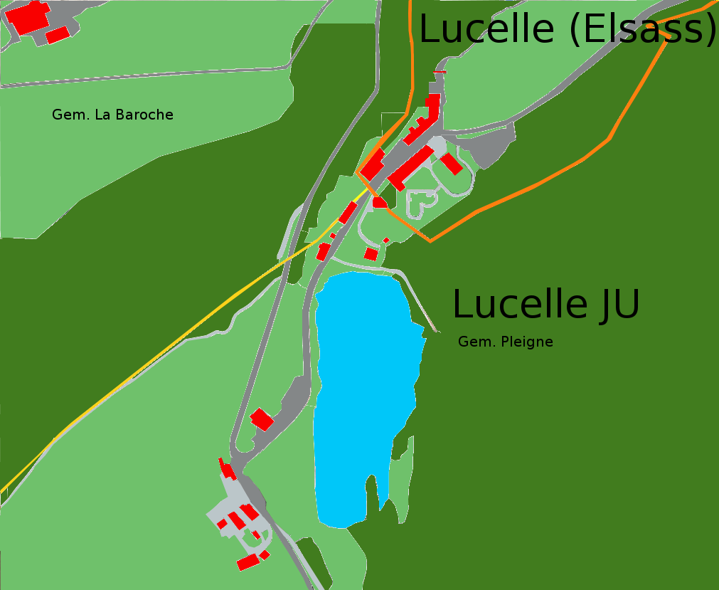 Karte der Aufteilung des ehemaligen Klosters Lützel und seiner Nebengebäude auf die Gemeinde Lucelle im Elsass und den Weiler Lucelle JU (Gemeinde Pleigne) Legende: dunkles orange: Staatsgrenze helles Orange: Gemeindegrenze zwischen La Baroche im Norden und Pleigne im Süden dunkelgrün: Wald